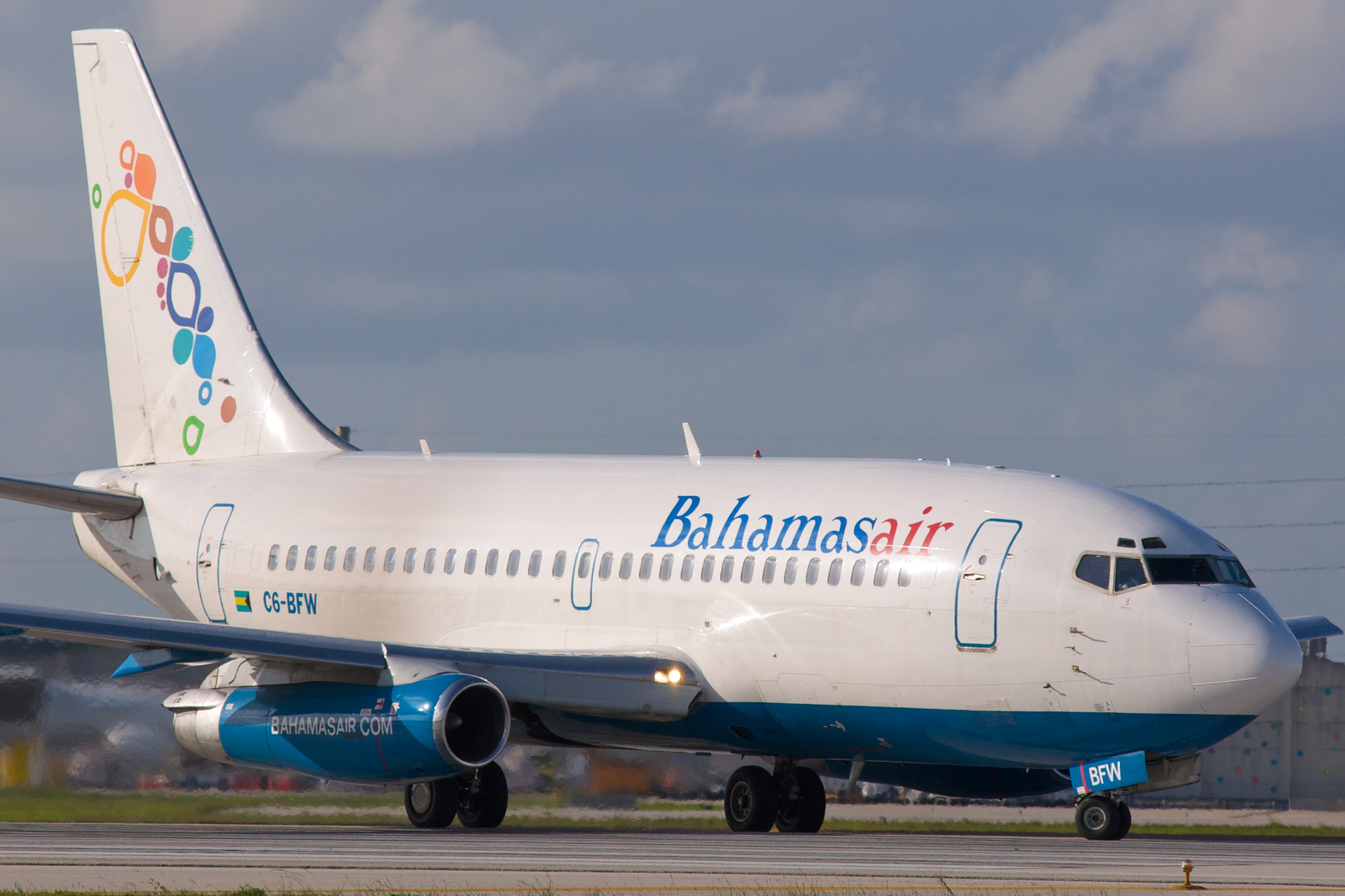 Bahamasair 737-200 lining up for departure, Runway 12, MIA